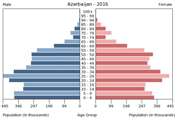 A population pyramid illustrates the age and sex structure of a country's population and may provide insights about political and social stability, as well as economic development. The population is distributed along the horizontal axis, with males shown on the left and females on the right. The male and female populations are broken down into 5-year age groups represented as horizontal bars along the vertical axis, with the youngest age groups at the bottom and the oldest at the top. The shape of the population pyramid gradually evolves over time based on fertility, mortality, and international migration trends.